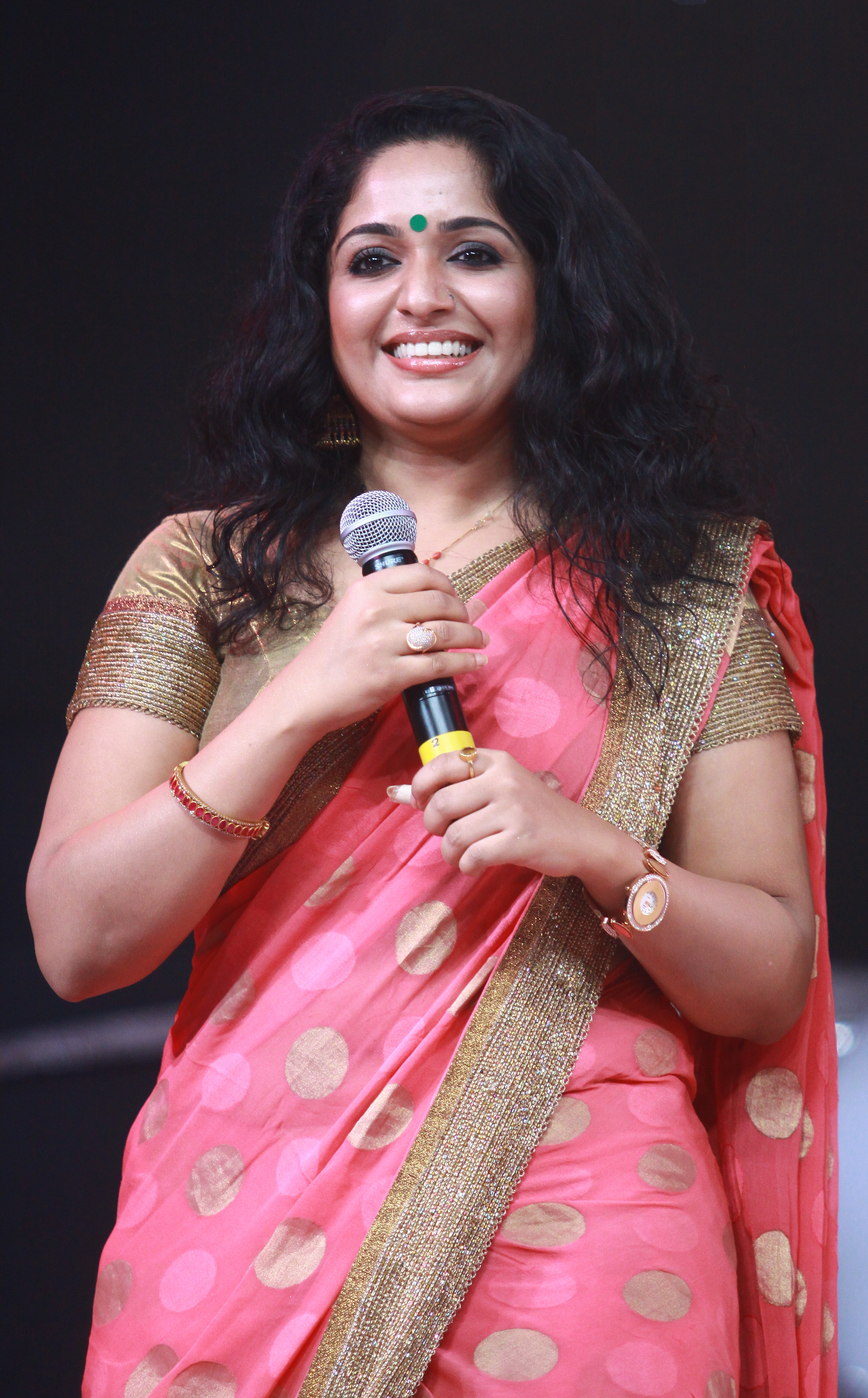 കാവ്യാ മാധവന്‍ 2013ല്‍